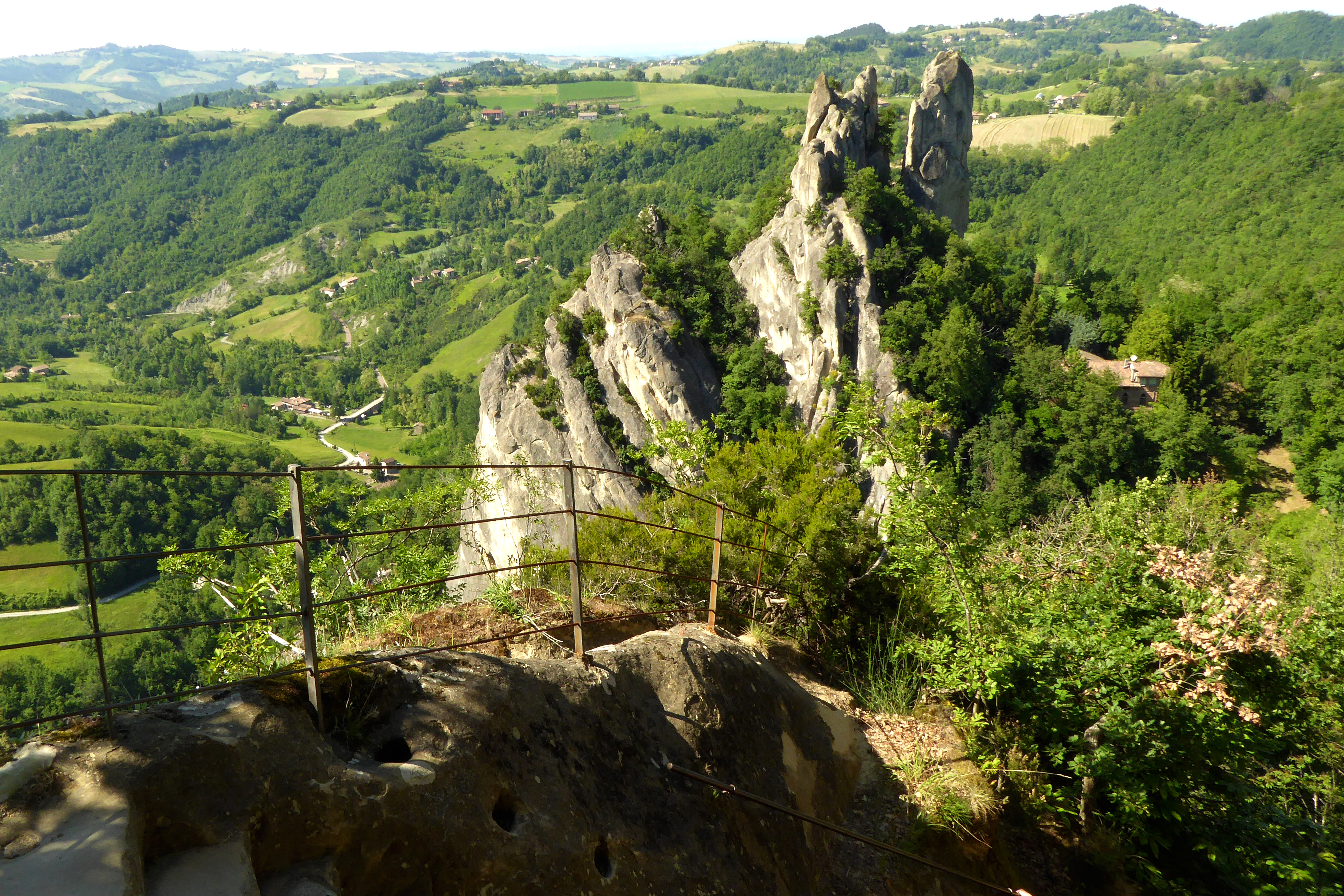 Parco Regionale dei Sassi di Roccamalatina - area protetta dell'Appennino modenese